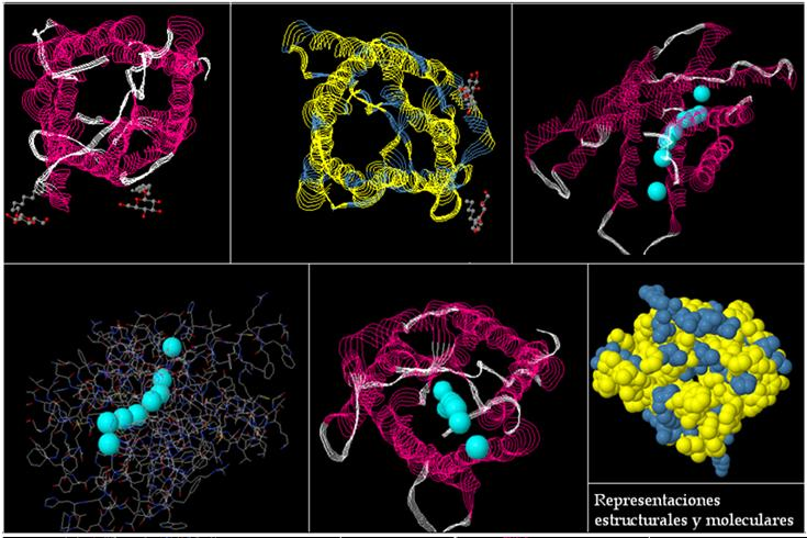 acuaporina 4